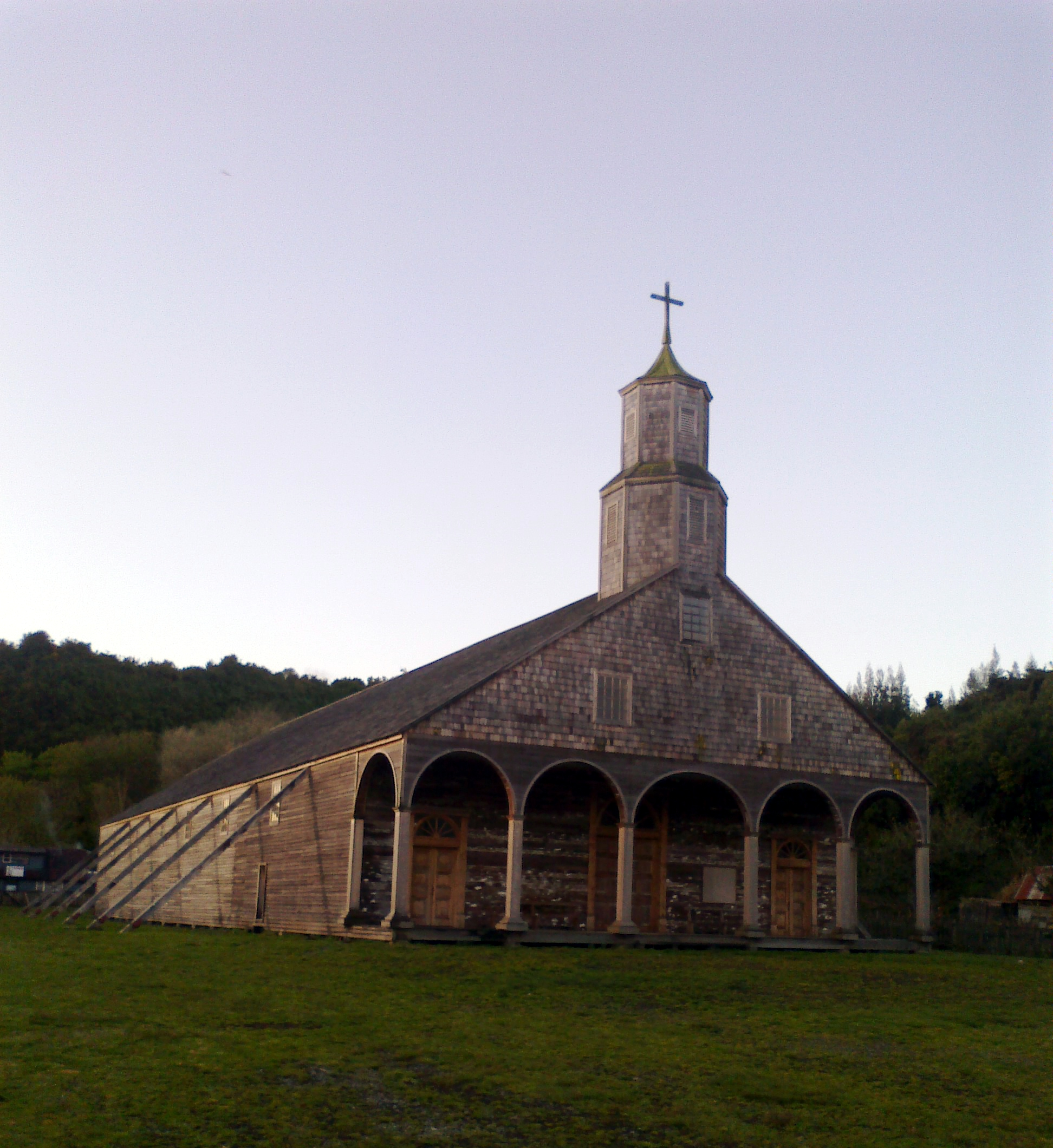 La iglesia de Quinchao después de la restauración de 2009-2010. Quinchao, comuna de Quinchao, Chile. This is a photo of a national monument in Chile: 703